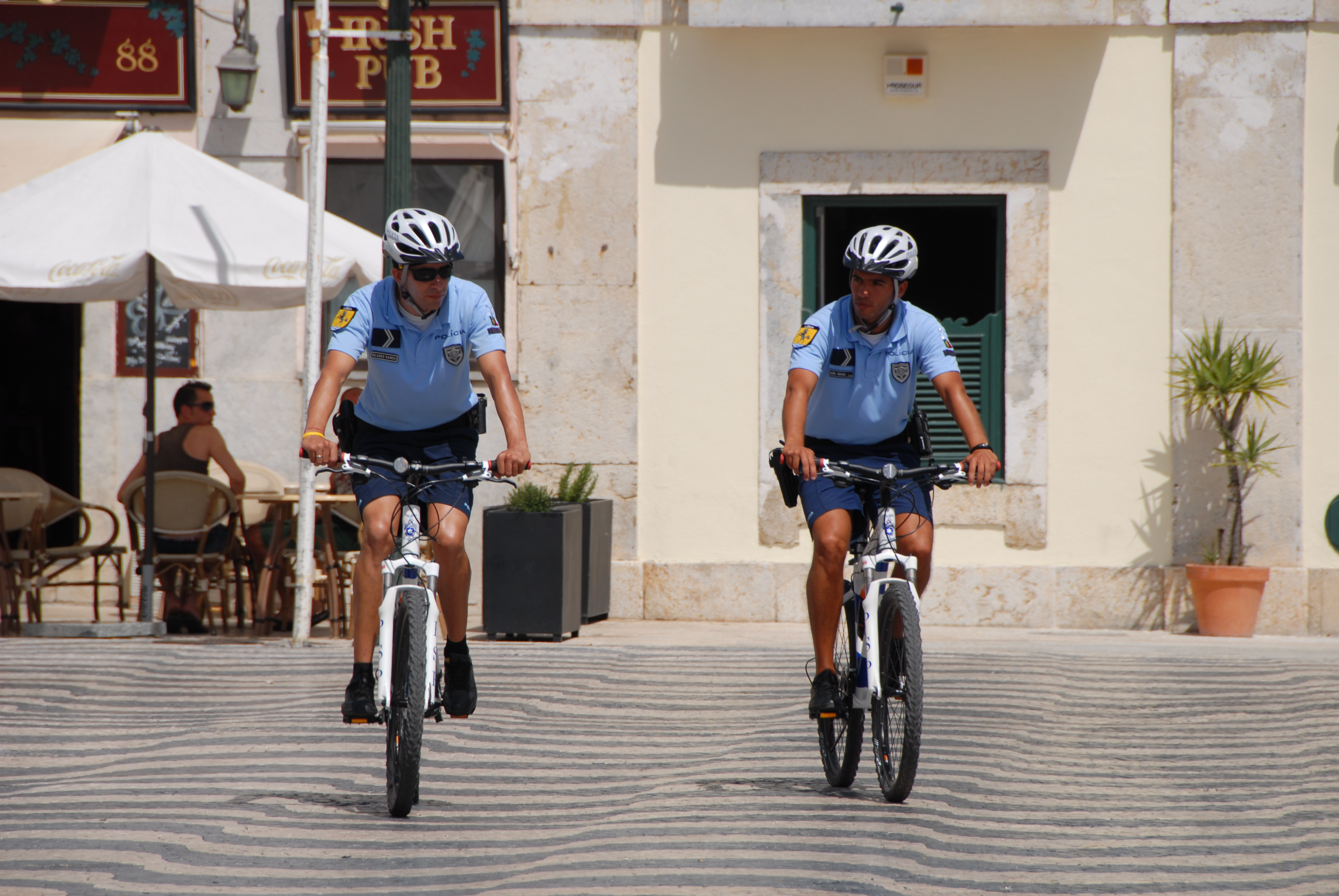 Ciclopatrulhas